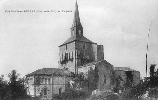 L'Eglise avant l'incendie de 1943